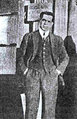 Edelmiro Correa Falcón, ex gobernador de Santa Cruz